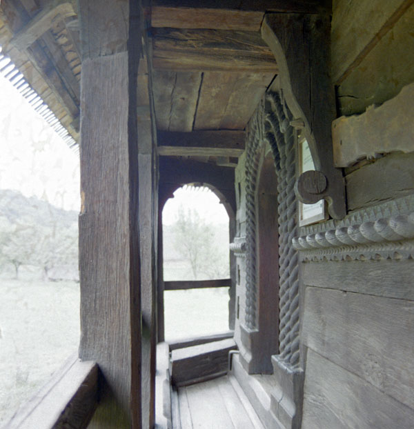 Consolă şi intrare în târnaţ.